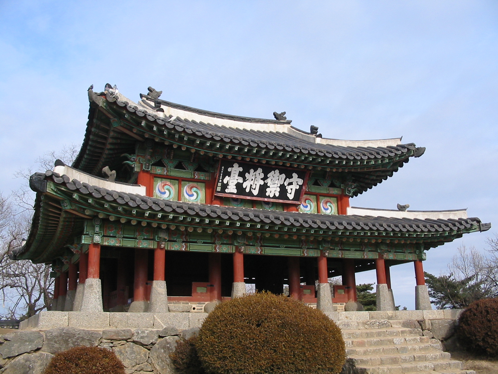 (한국어) 수어장대, 남한산성 소재